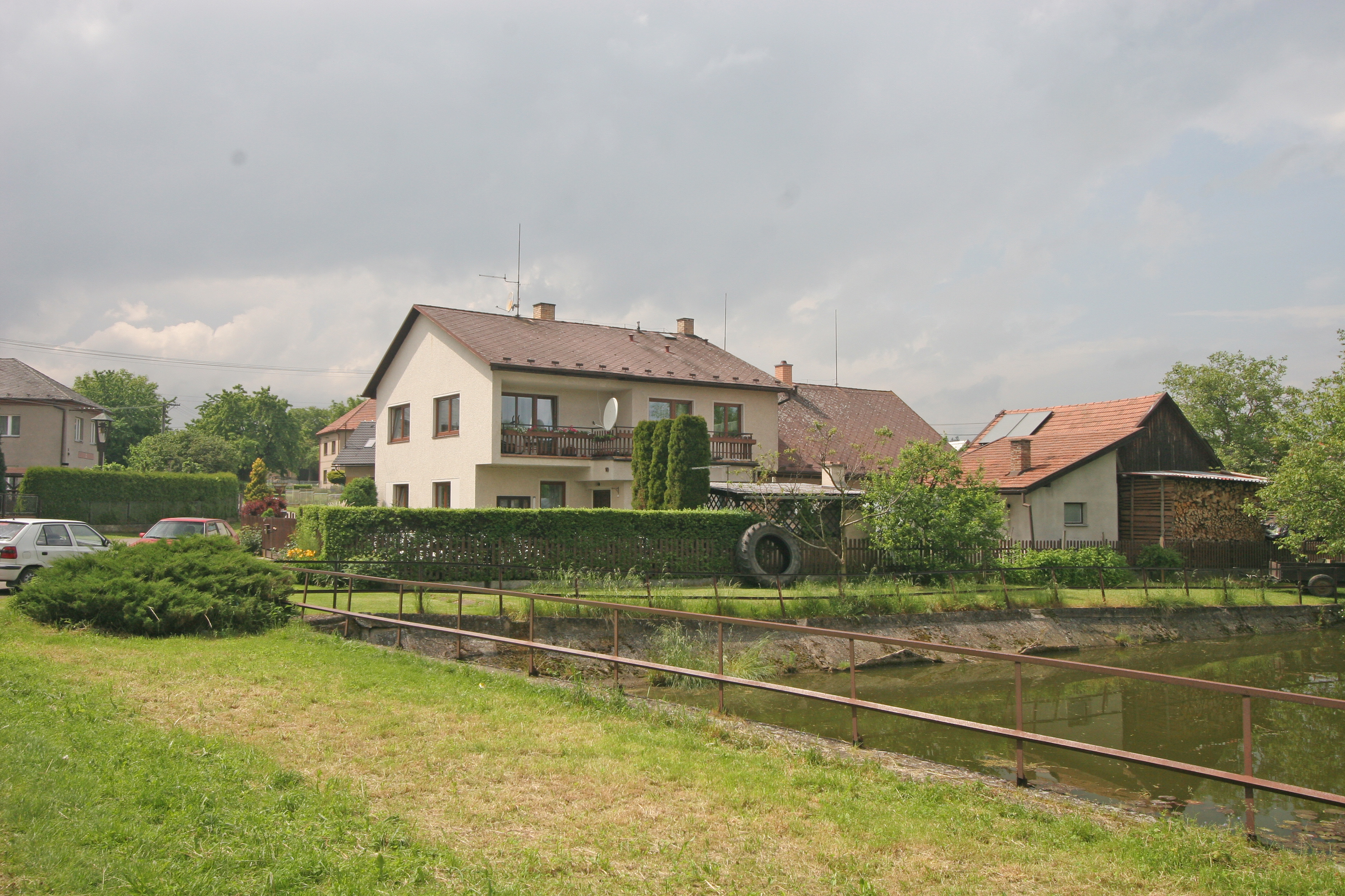 Smrkový Týnec čp. 10